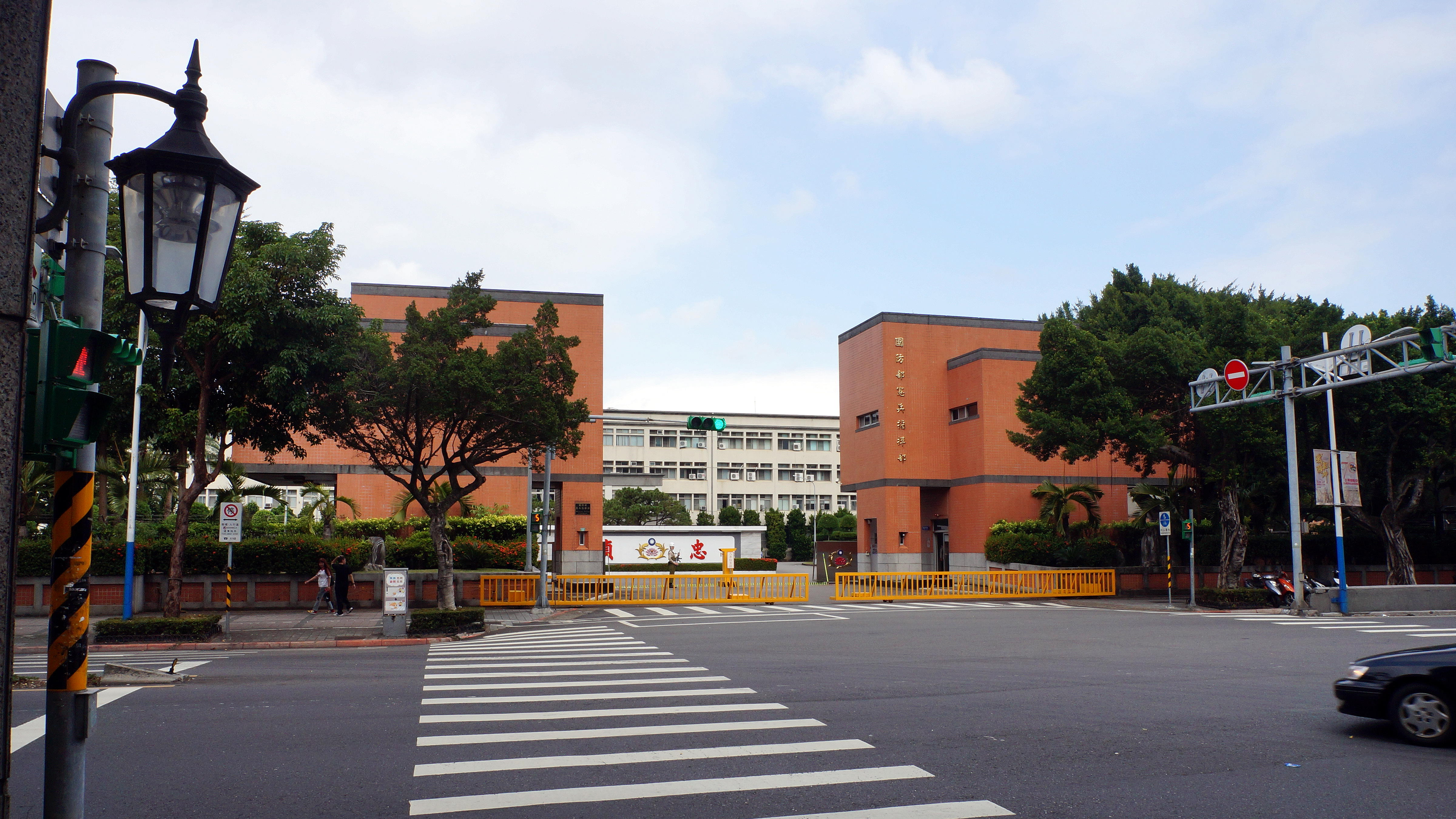 中華民國國防部憲兵指揮部正門，朝向臺北市中山區民族東路。